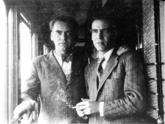 Los hermanos Federico García Lorca y Francisco García Lorca viajando en tren en 1930